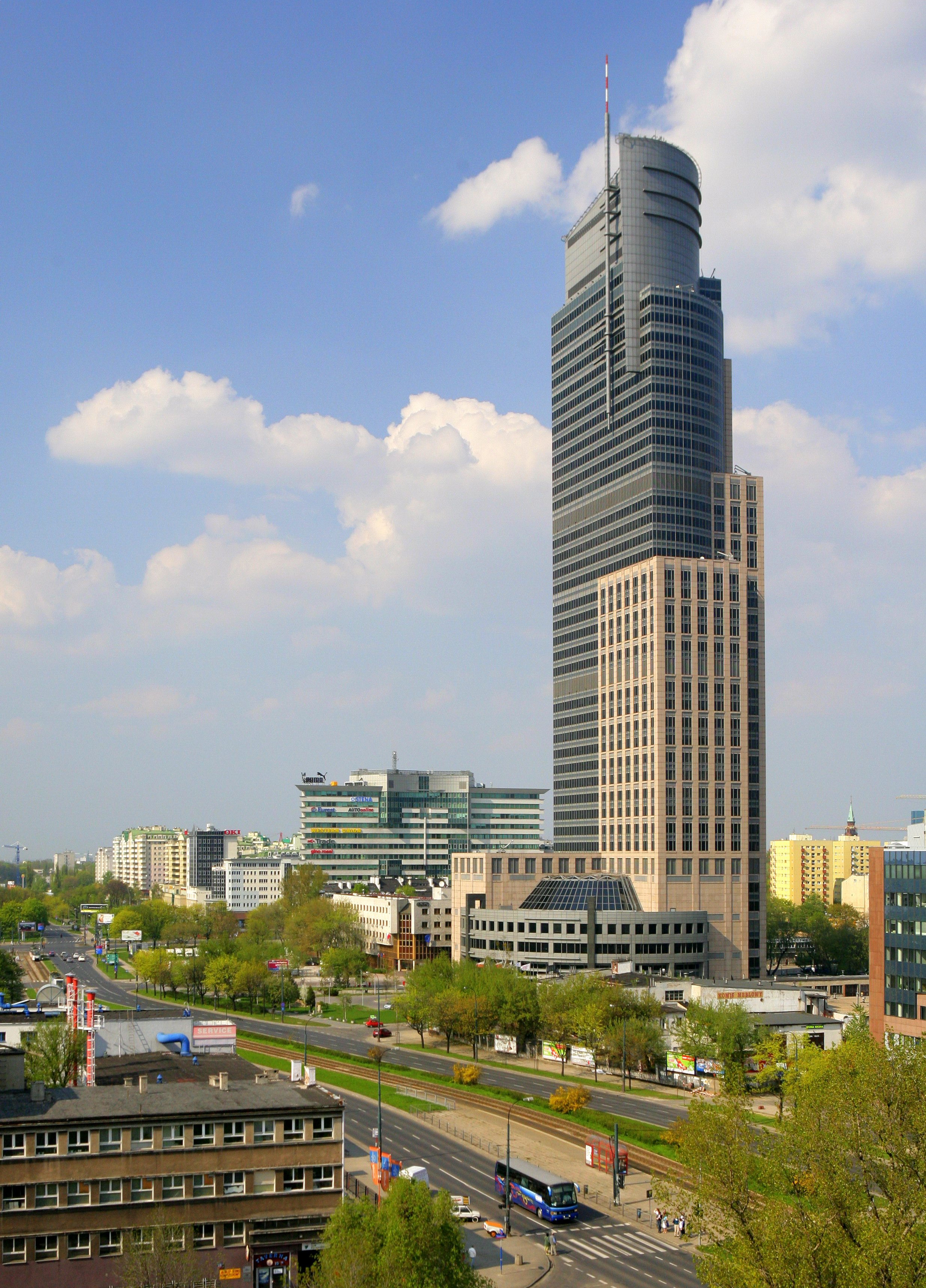 Najwyższy budynek biurowy w Warszawie. (fot.: Cezary Piwowarski)